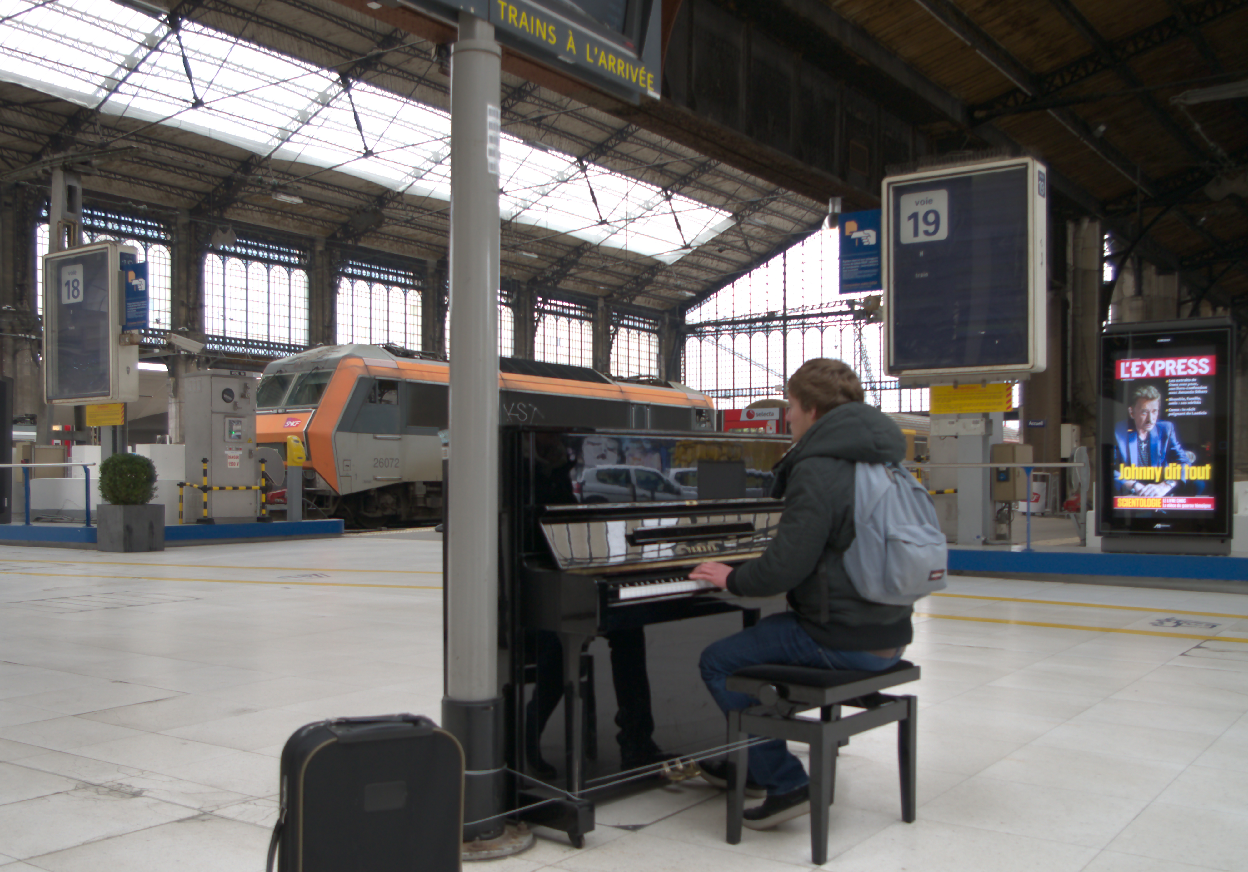 Piano dans le hall de la gare d'Austerlitz